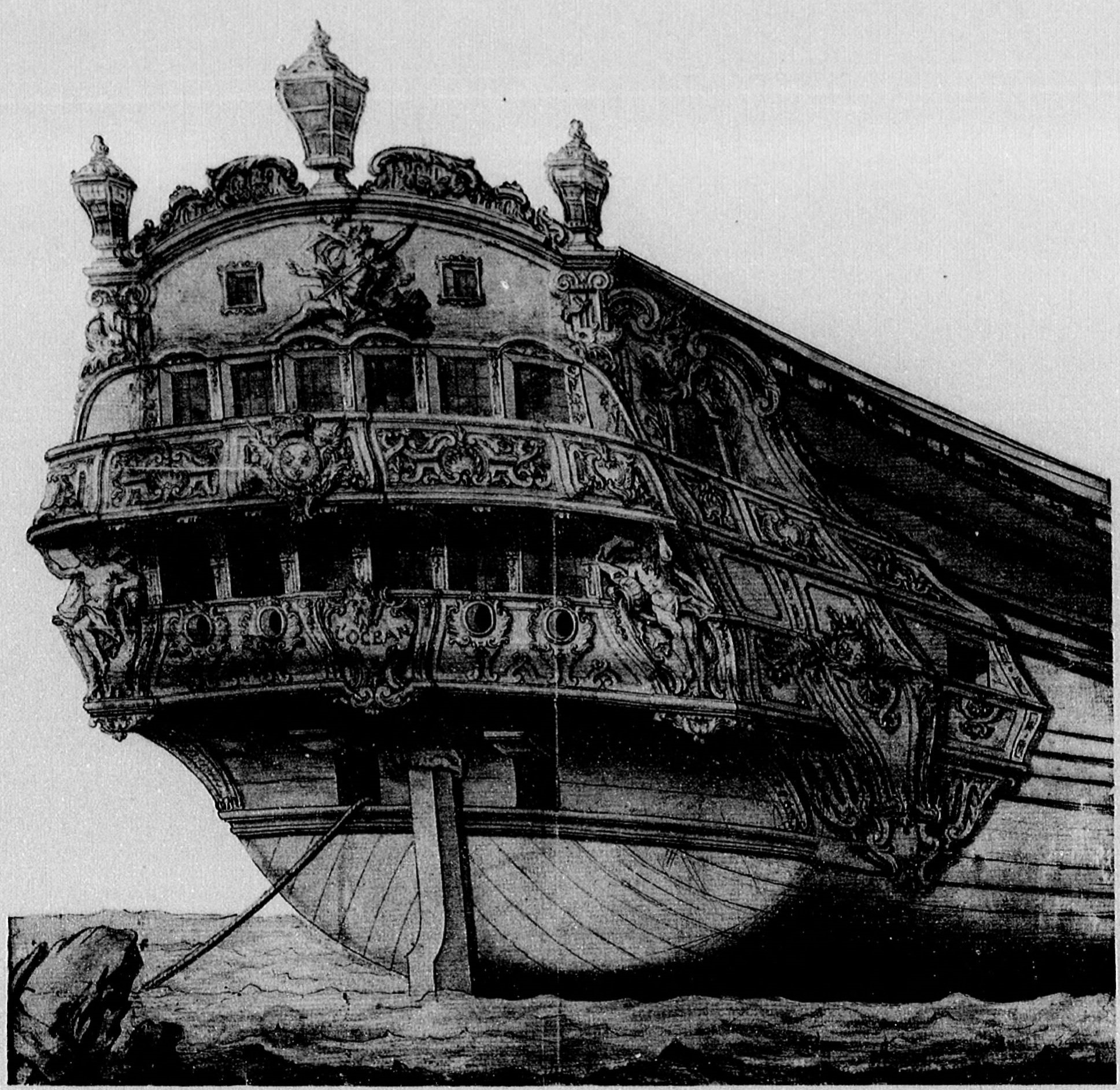 Décorations du château arrière de l'Océan, vaisseau de ligne français de 80 canons, lancé en 1756, détruit en 1759. Photogravure publiée dans la Collection de plans ou Dessins de navires et de bateaux anciens et modernes, existants ou disparus : avec les éléments numériques nécessaires à leur construction, par le vice-amiral Paris, en 1882. NB : Erreur probable de l'amiral Pâris qui date le dessin de 1696 et l'affecte à un trois-ponts. Mais aucun navire ne porte ce nom dans la flotte de Louis XIV à cette époque et les deux galeries du gaillard montrent qu'il s'agit d'un deux-ponts, ce qui correspond au vaisseau de 1756.